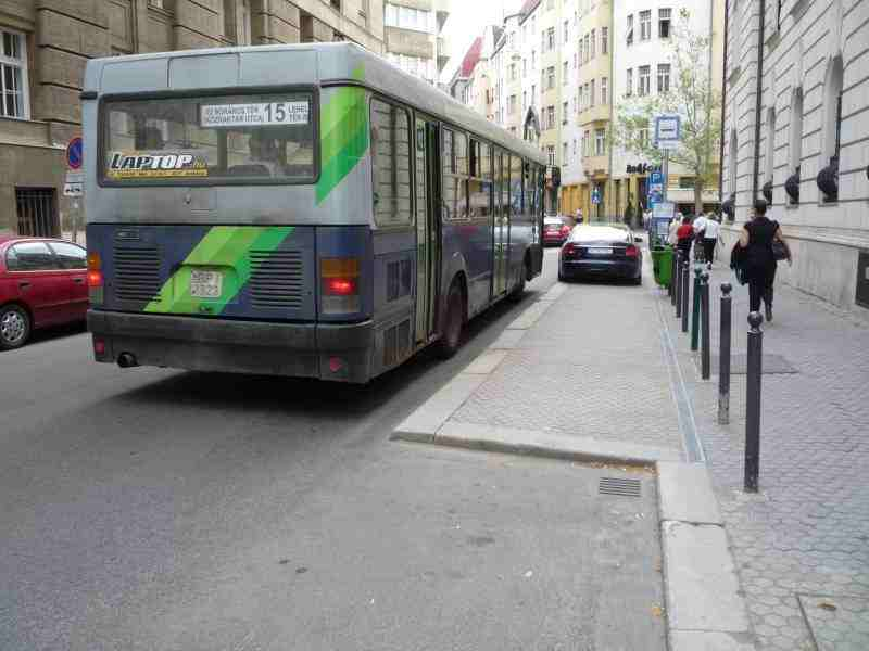 Autobus na przystanku z półwyspem w centrum Budapesztu (Markó utca na Honvéd utca)